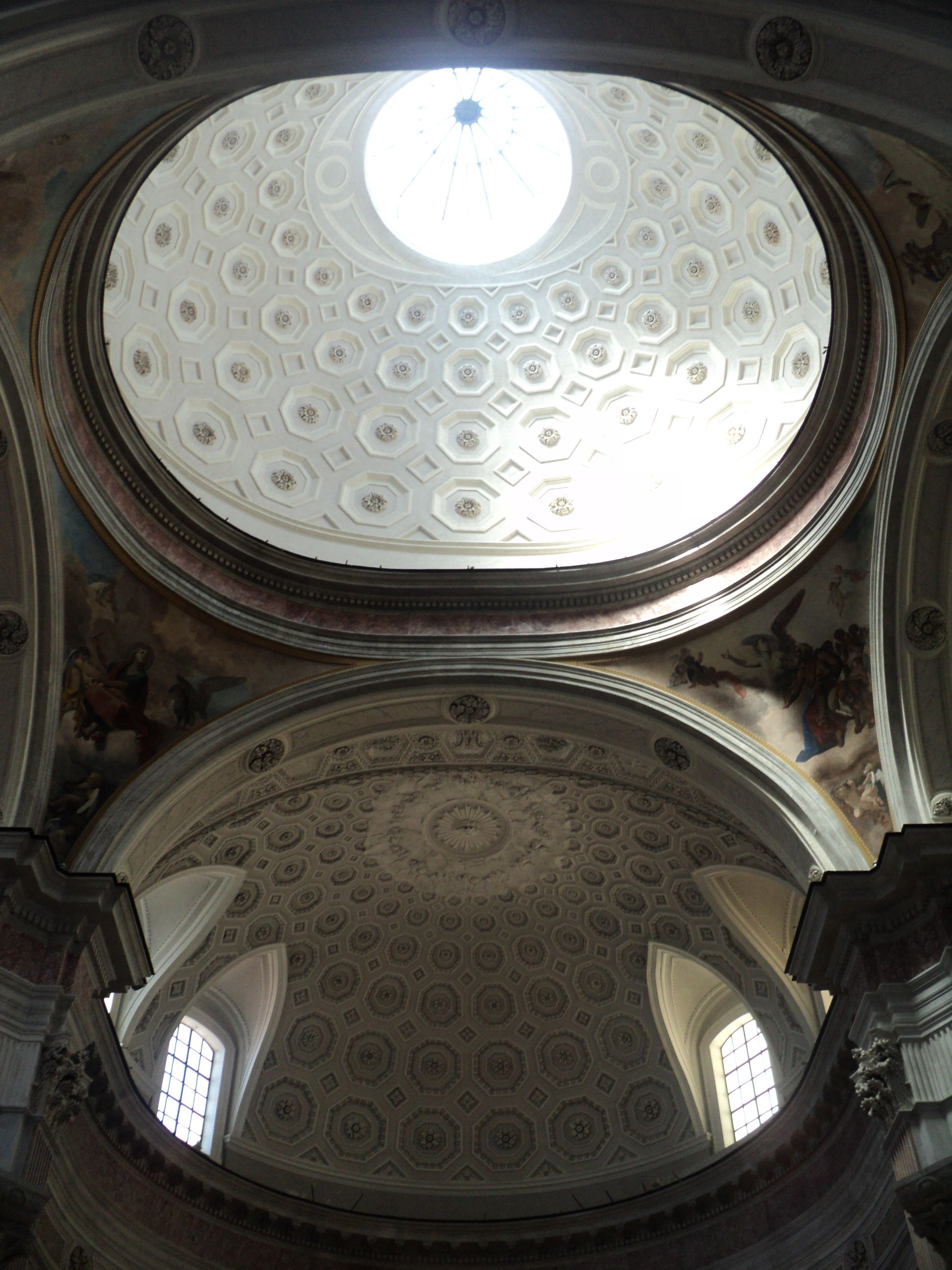 Basilica di San Giovanni Maggiore (Napoli) - Particolare della "mezza cupola"